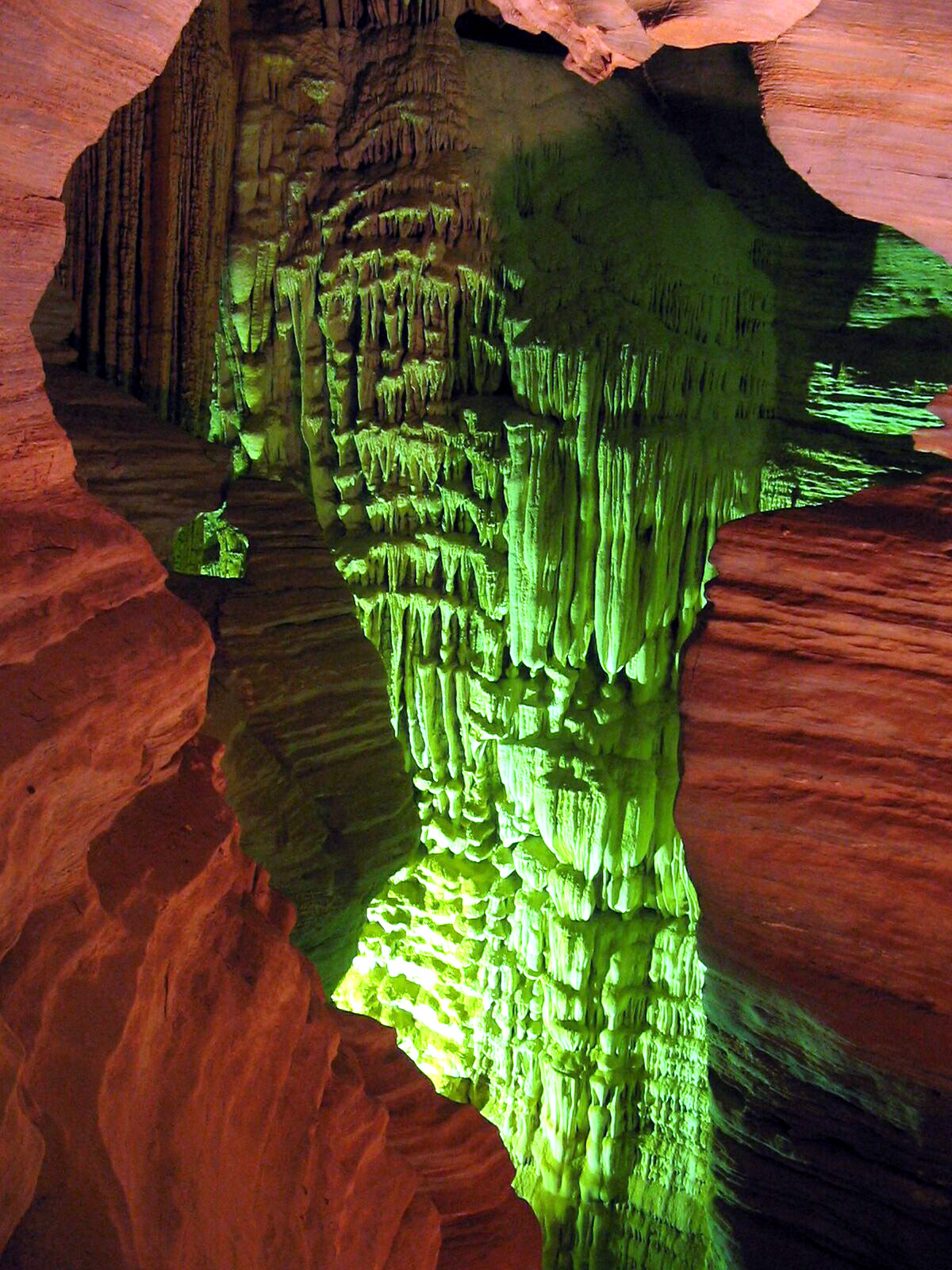 Big column formed by hundreds of stalactites and stalagmites in Gruta da Lapinha, near Belo Horizonte, MG Brazil Coluna formada por centenas de estalactites e estalagmites na Gruta da Lapinha, próximo a Belo Horizonte, MG, Brasil.